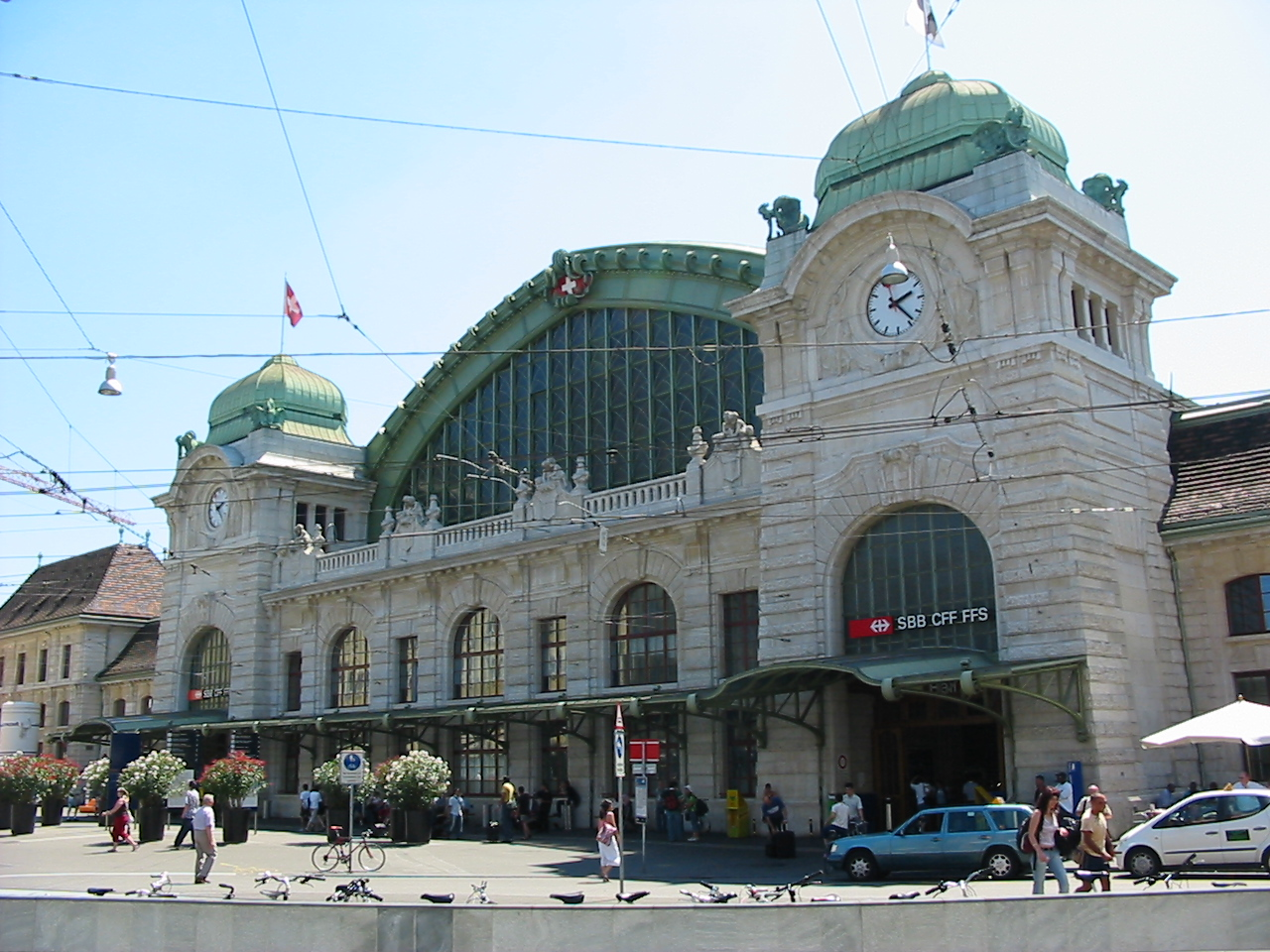 Station Bazel (SBB CFF FFS). Zelfgenomen foto. Bazel